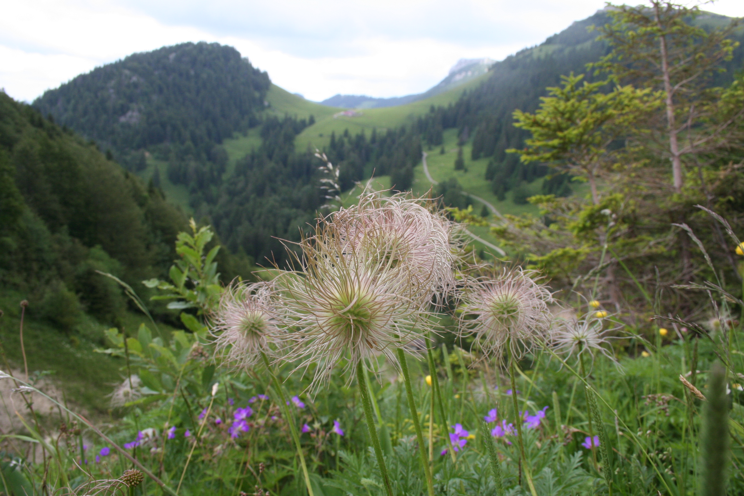 Pulsatille des Alpes (Pulsatilla alpina) en fruit sous le Chasseron.